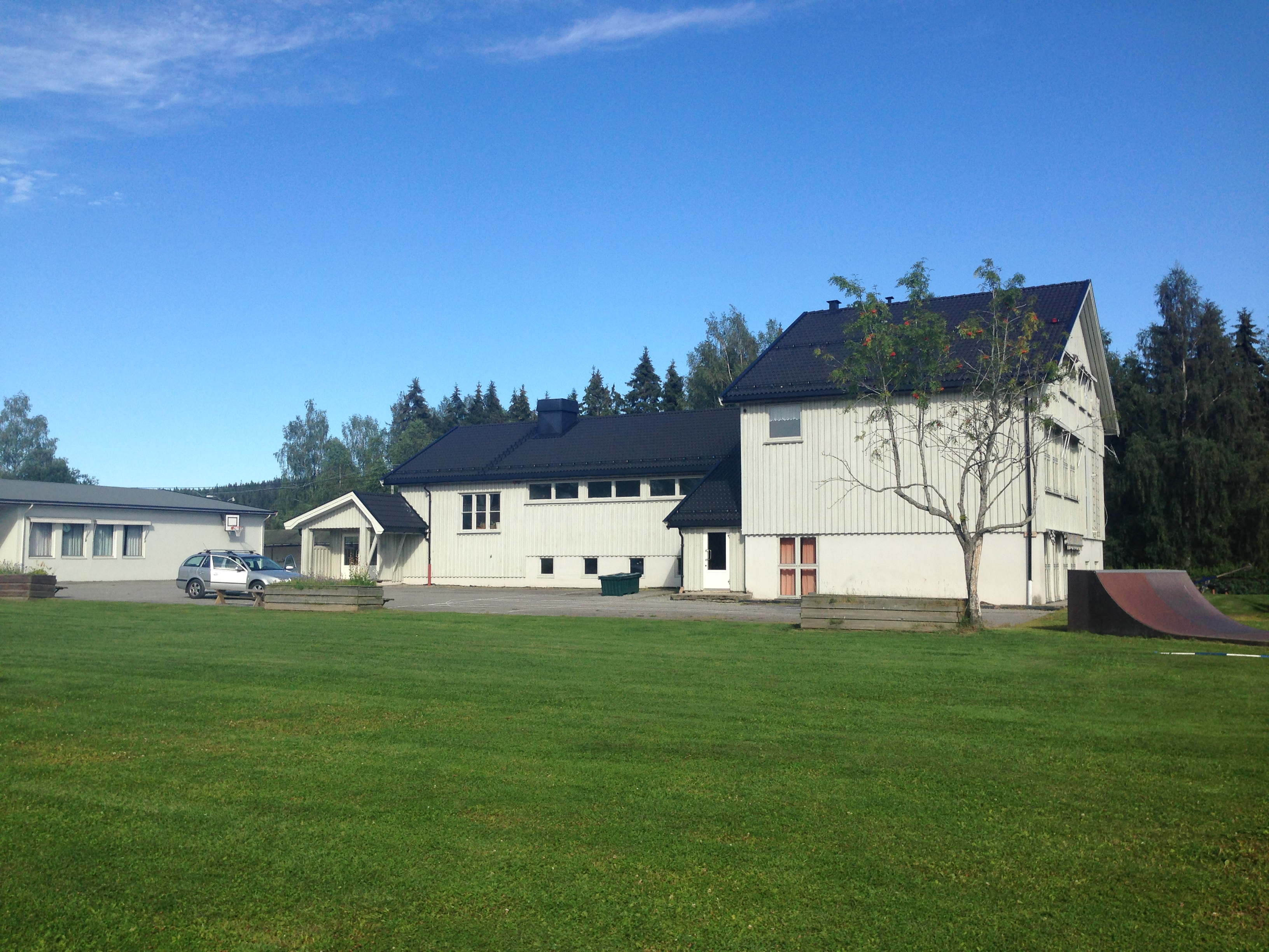 Steinerskolen Eidsvoll på Finstad